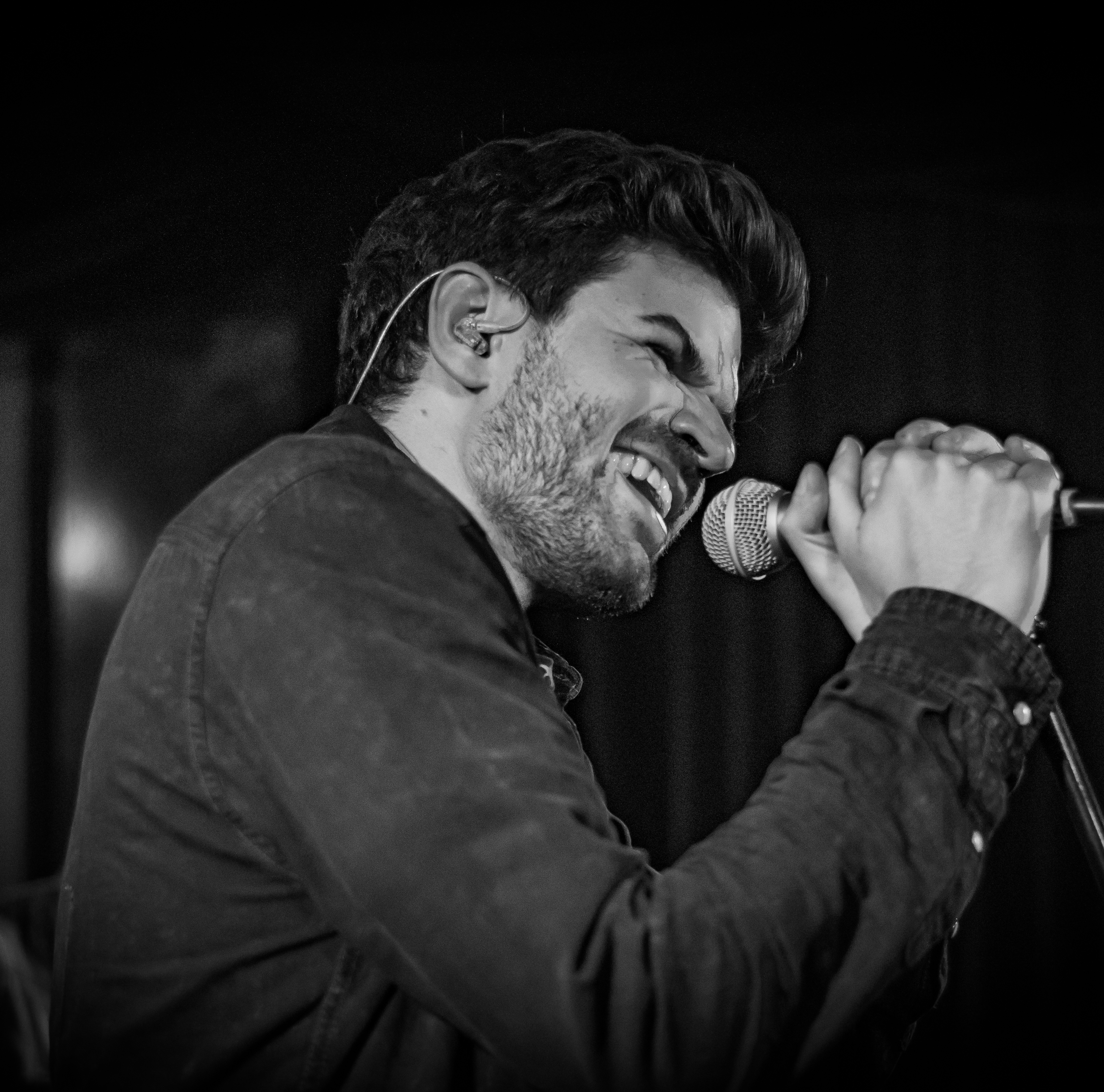 Henry And The Waiter at Blue Shell Cologne